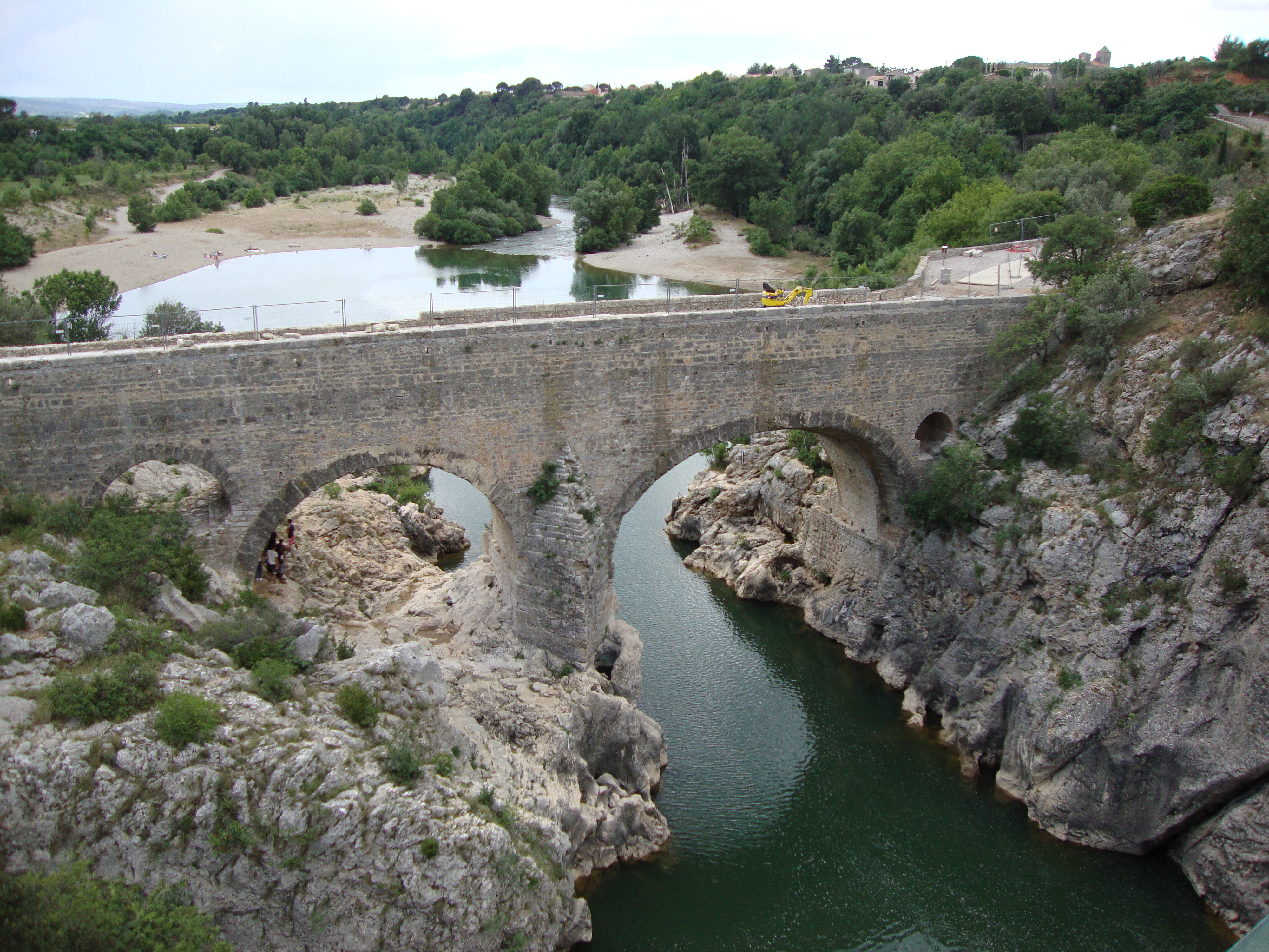 Saint-Jean-de-Fos (Hérault, Fr) Pont du Diable sur l'Hérault.